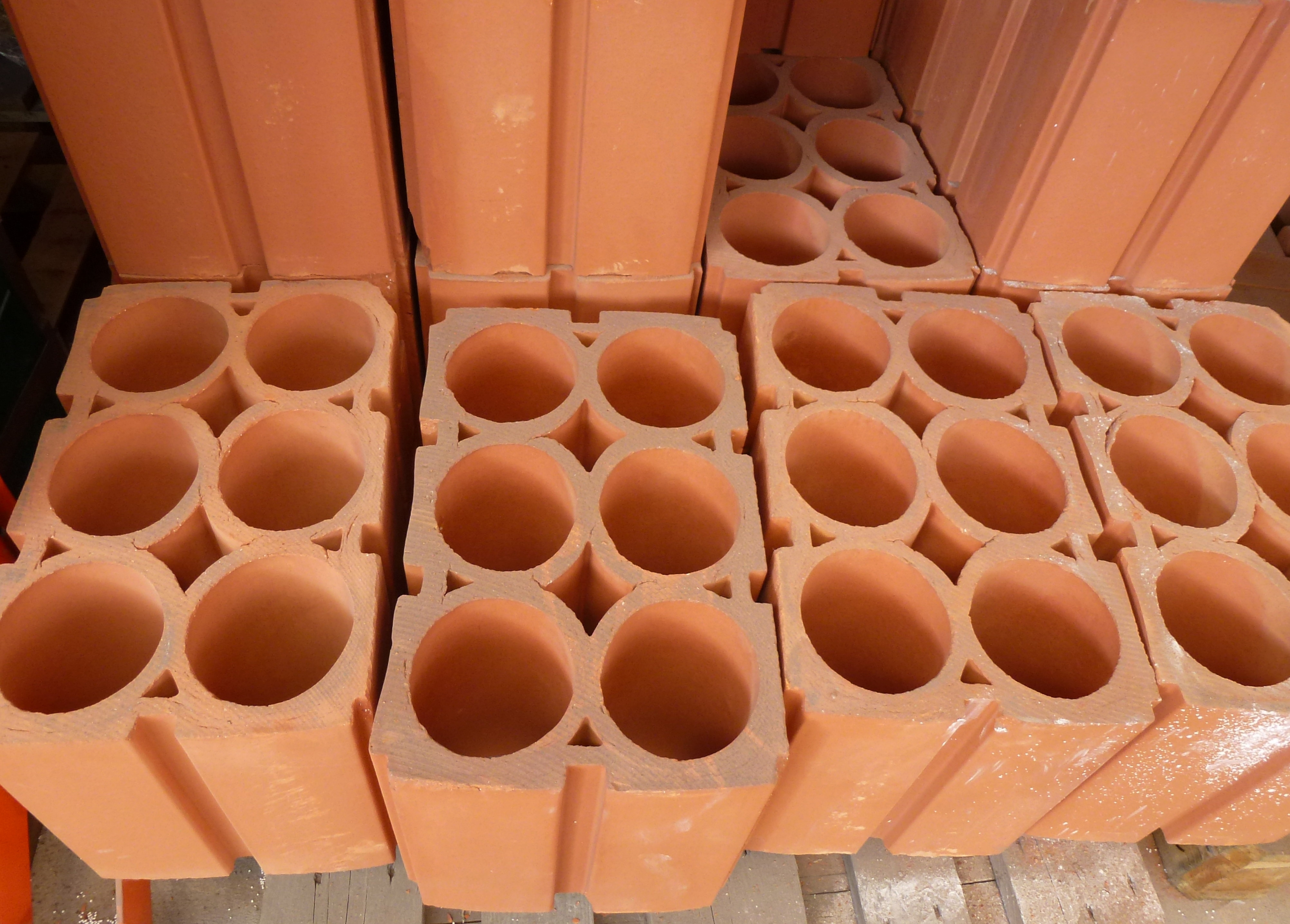 Tegelrör